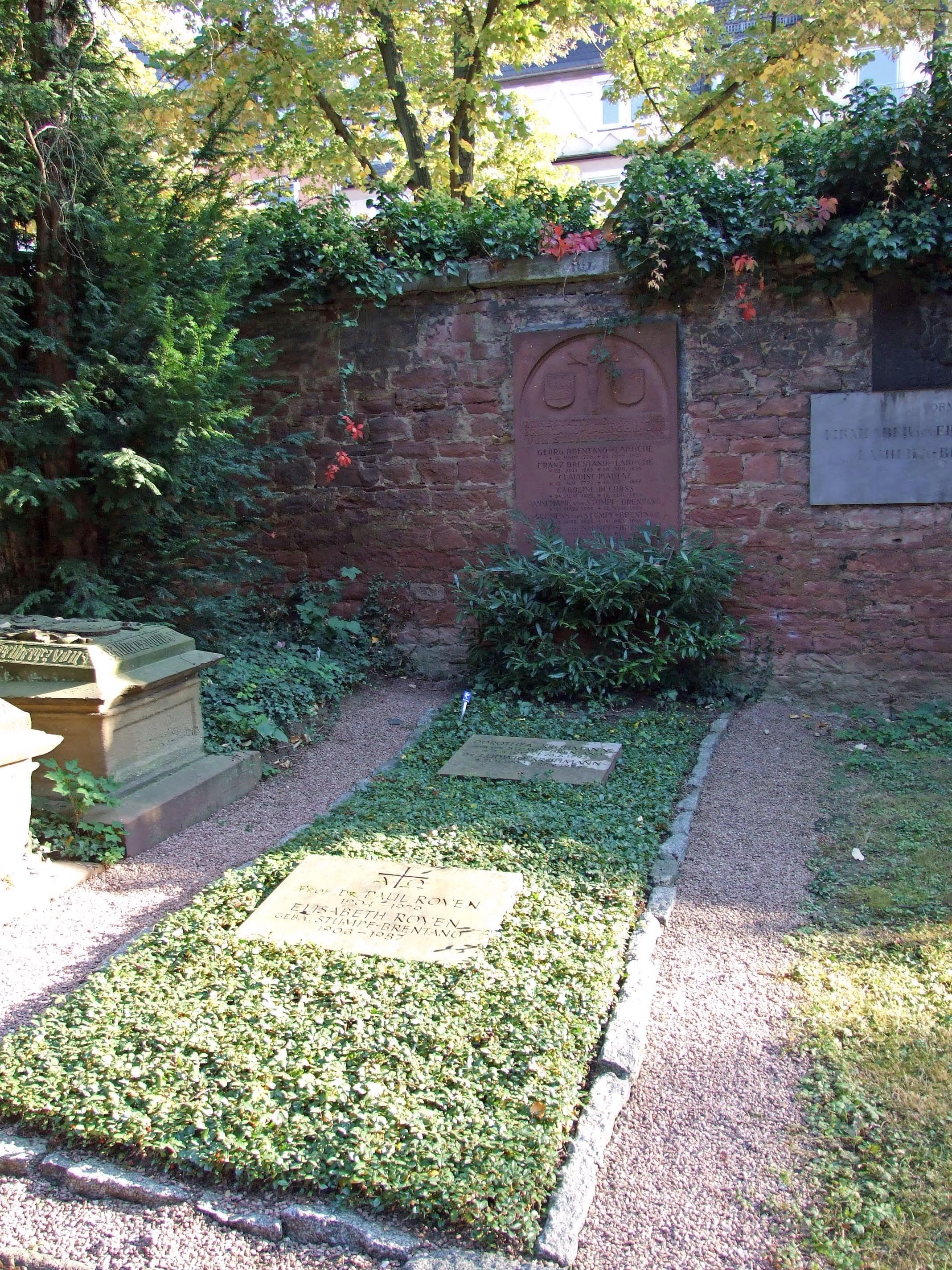 Brentano Grabstelle auf dem Hauptfriedhof in Ffm